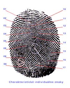 Daktiloskopia - Odtlacok